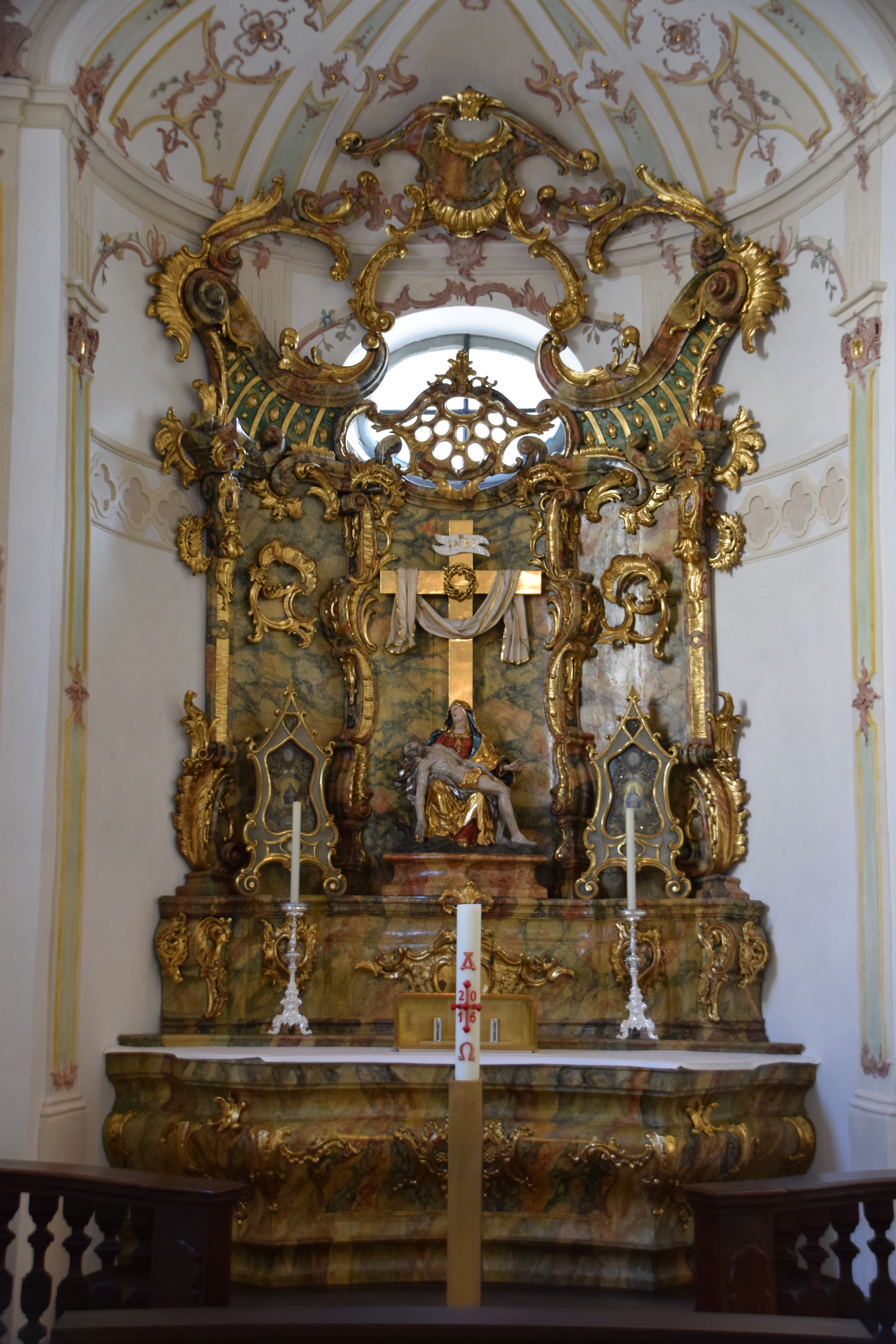 Nördlicher Seitenaltar der Stiftspfarrkirche St. Kassian in Regensburg